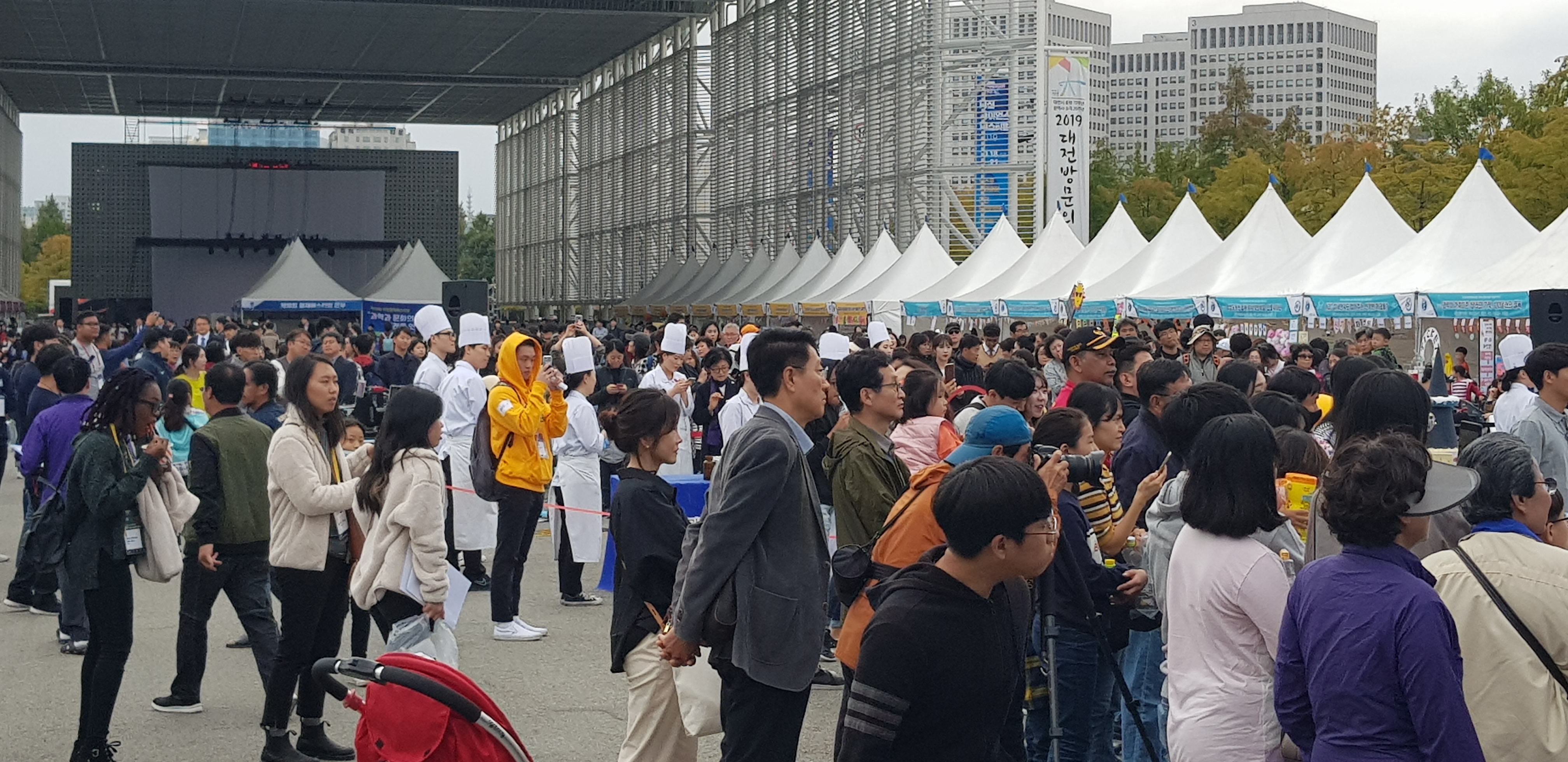 2019 대전사이언스페스티벌1